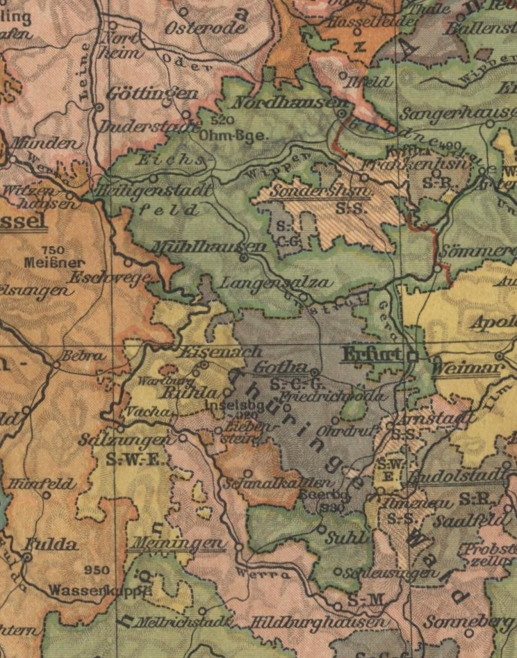 Der Regierungsbezirk Erfurt (grün, ohne Landkreis Ziegenrück)